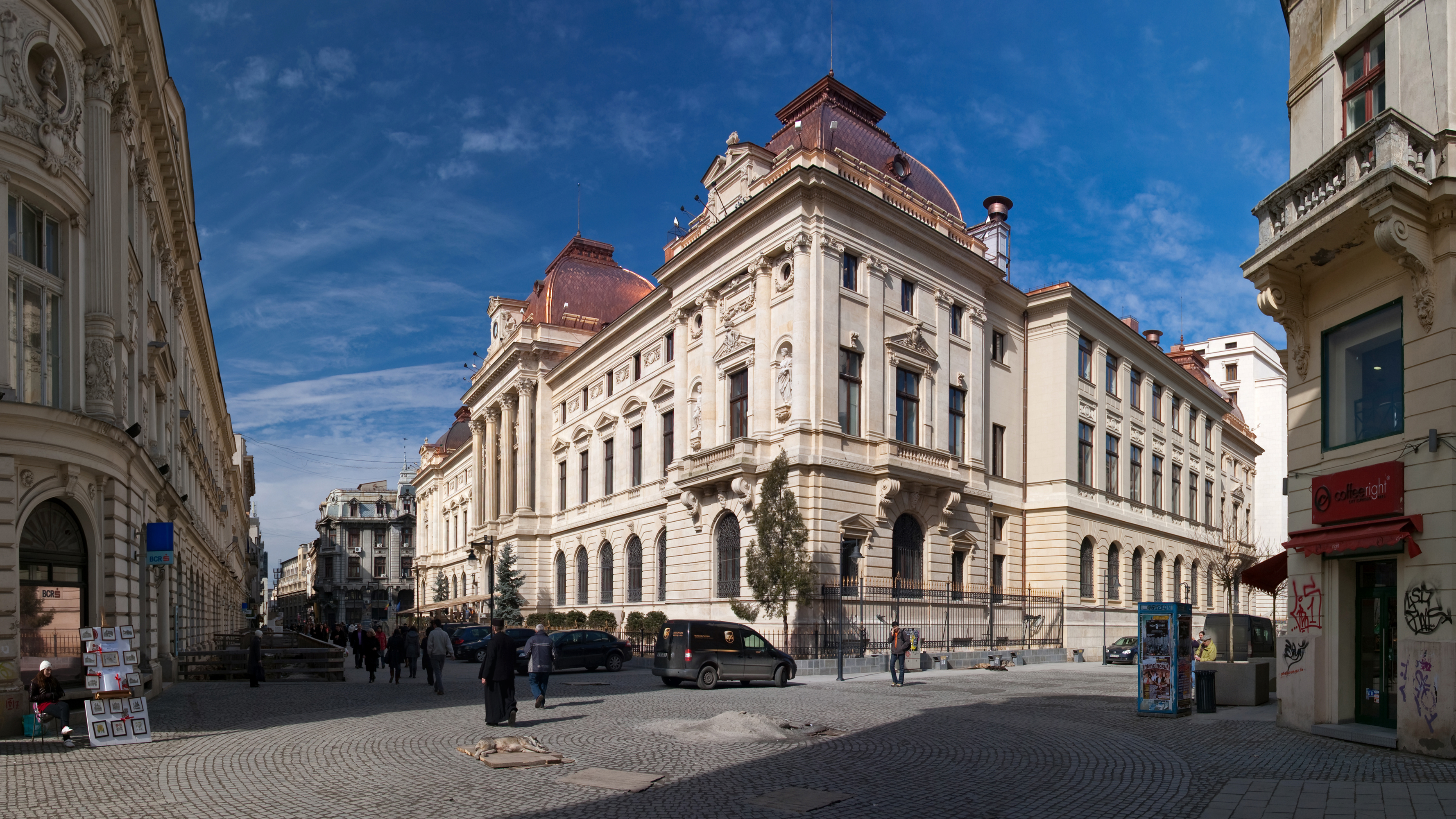 Panorama prezinta Corpul vechi al Bancii Nationale a Romaniei, vazut dinspre intersectia strazii Lipscani cu strada Smardan.